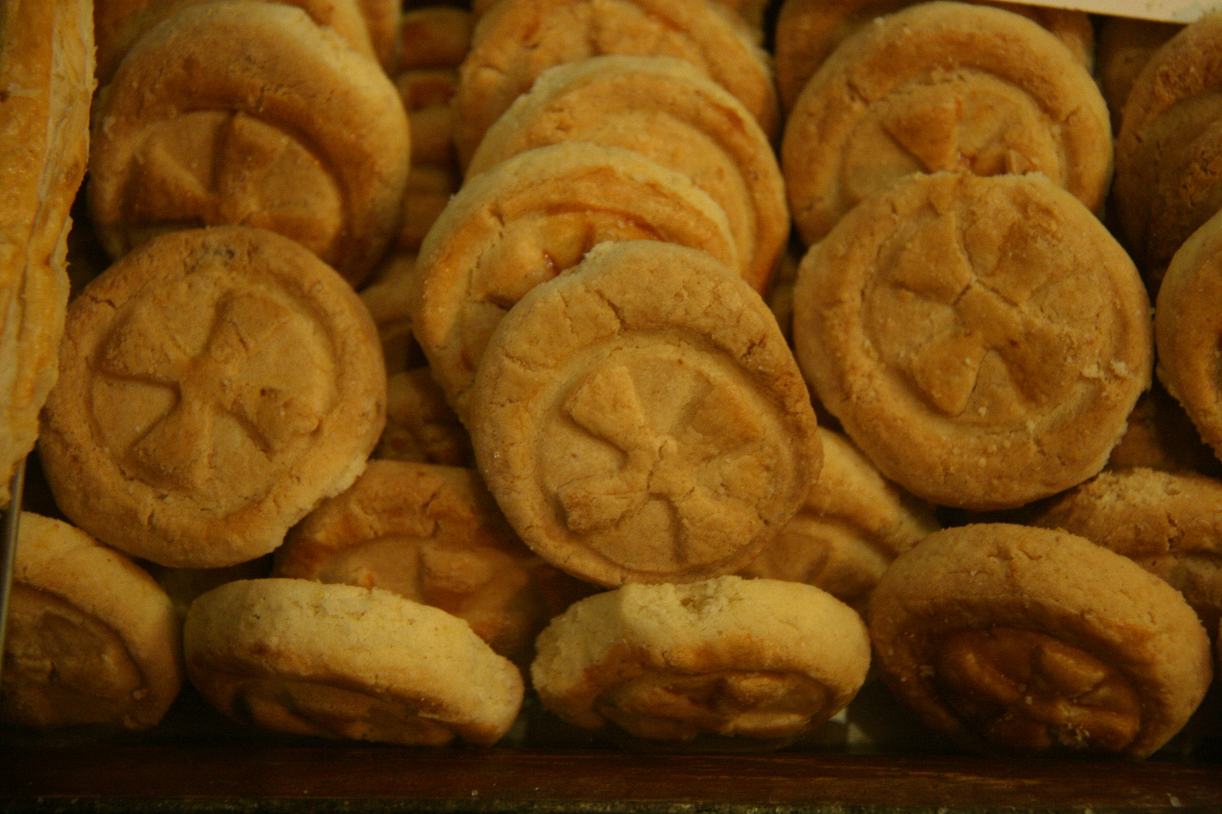 Panecillos de San Antón (La Marquesita)